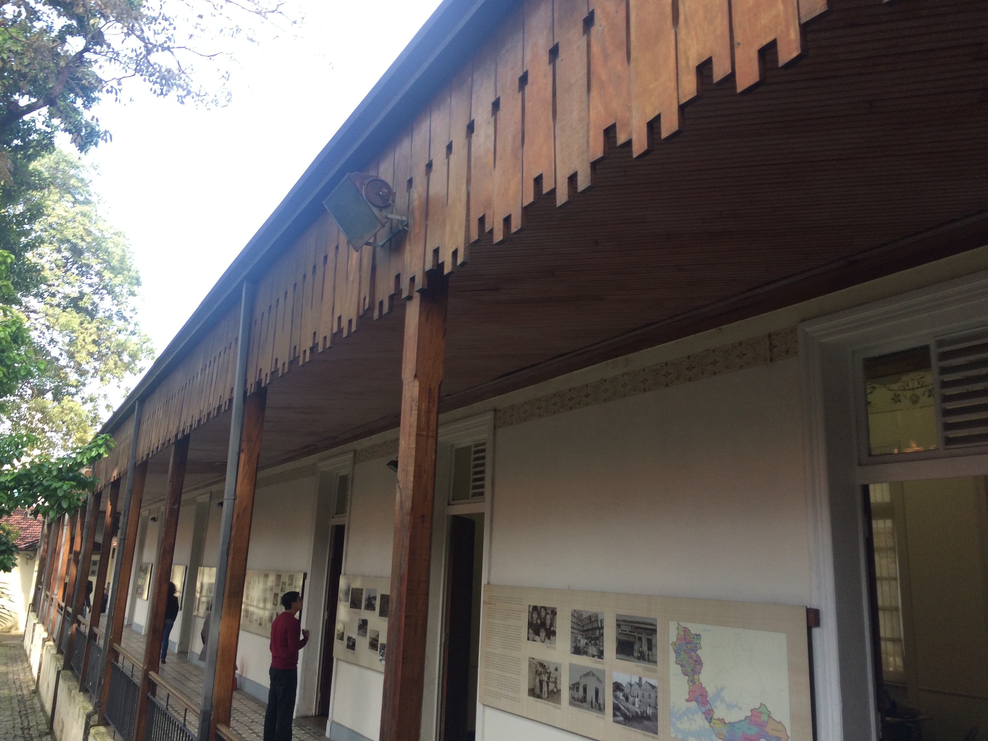 Detalhes do barrado de madeira, reprodução exata do original, do Museu de Santo André Dr. Octaviano Armando Gaiarsa, em Santo André (SP), Brasil.